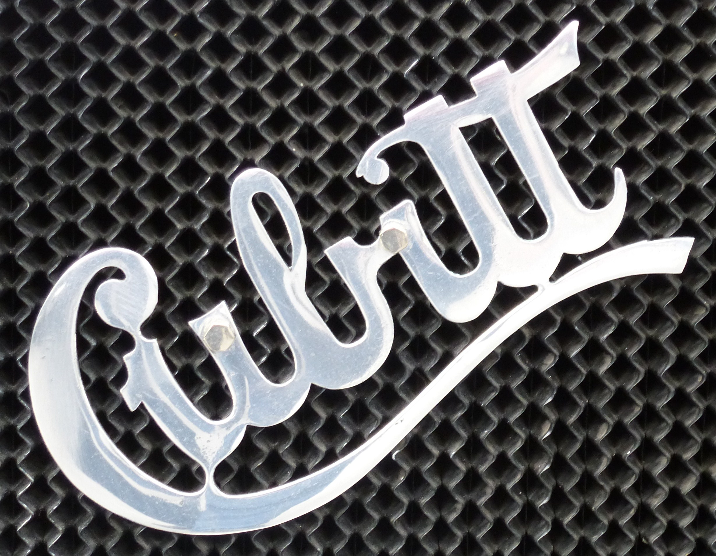 Emblem Cubitt Schriftzug